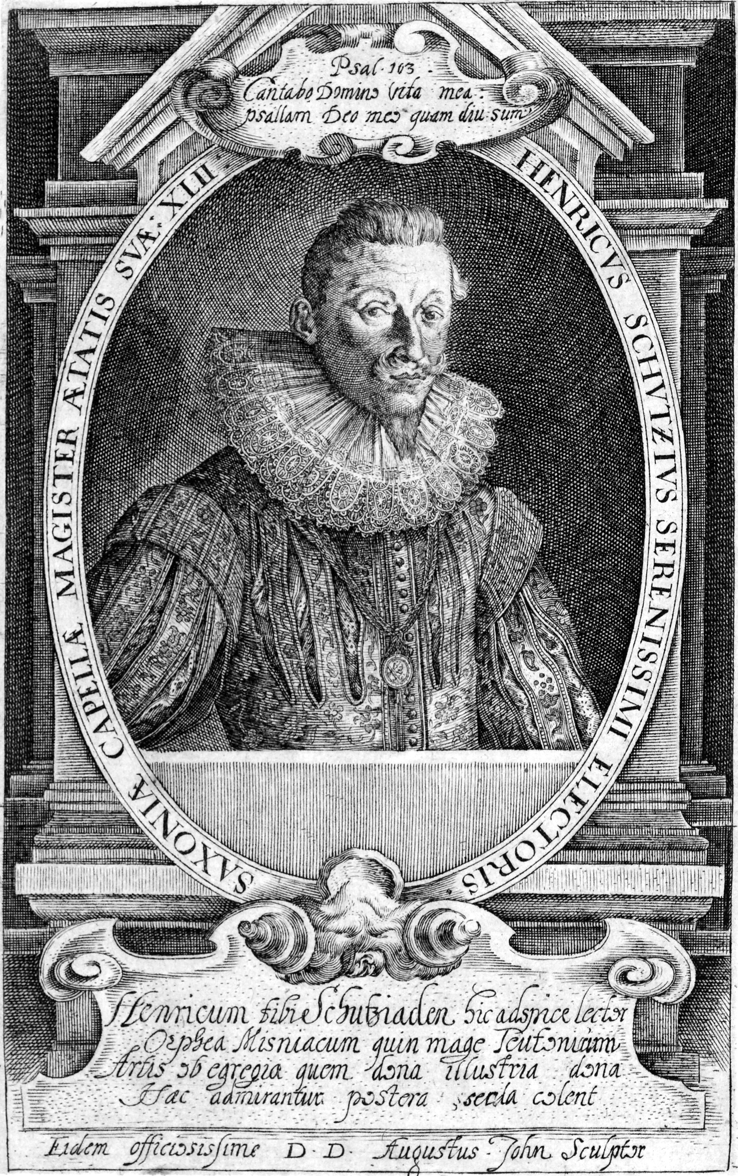 Depicted person: Heinrich Schütz